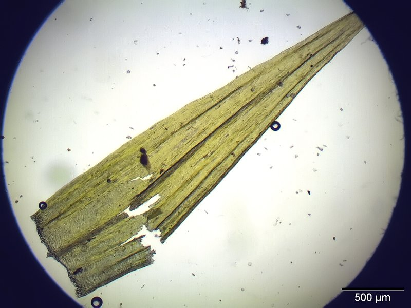 Glänzendes Filzschalfmoos (Tomenthypnum nitens), Blatt, 40x